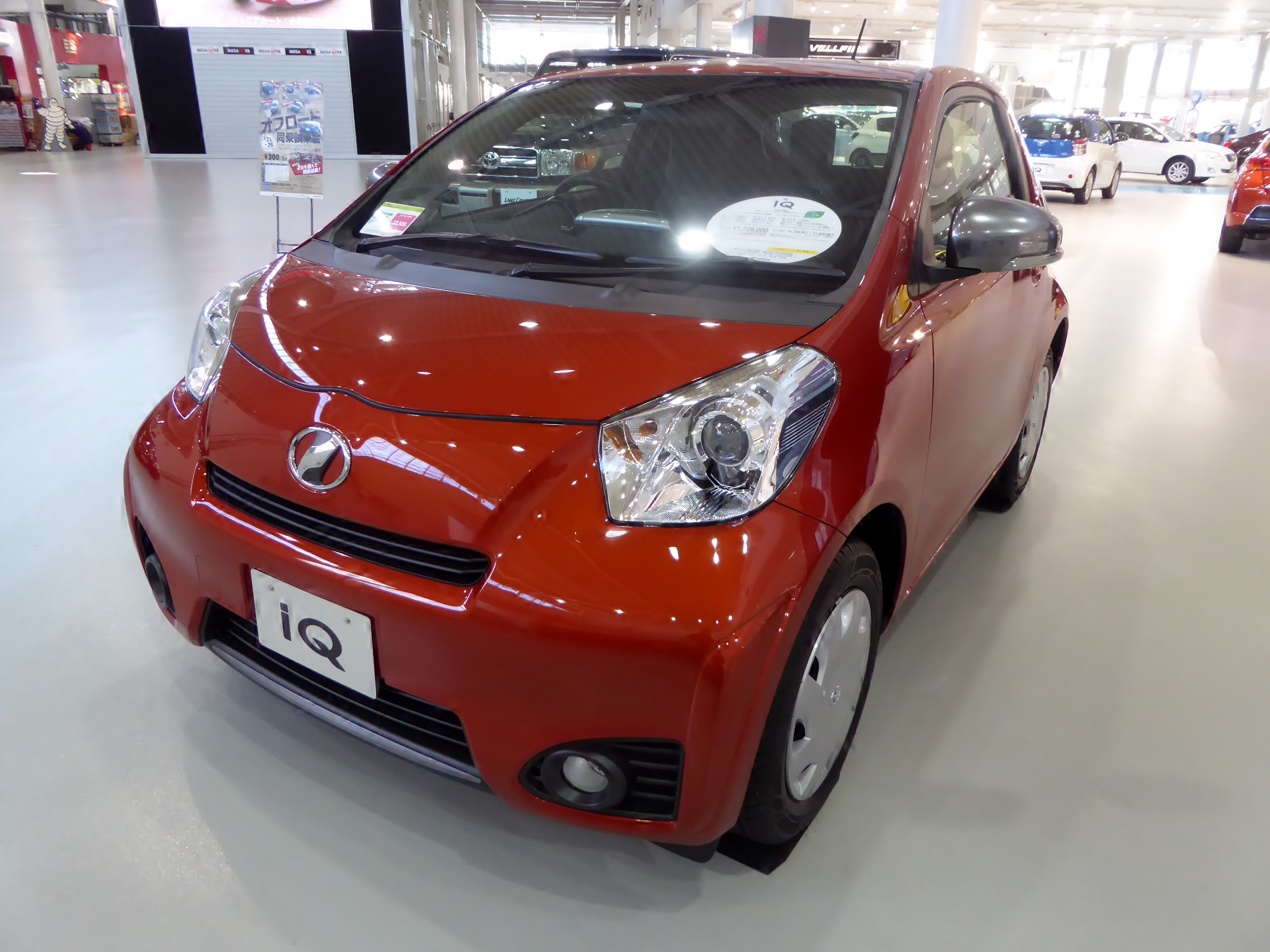 NGJ10型トヨタ・iQ 130Gをフロントから撮影。